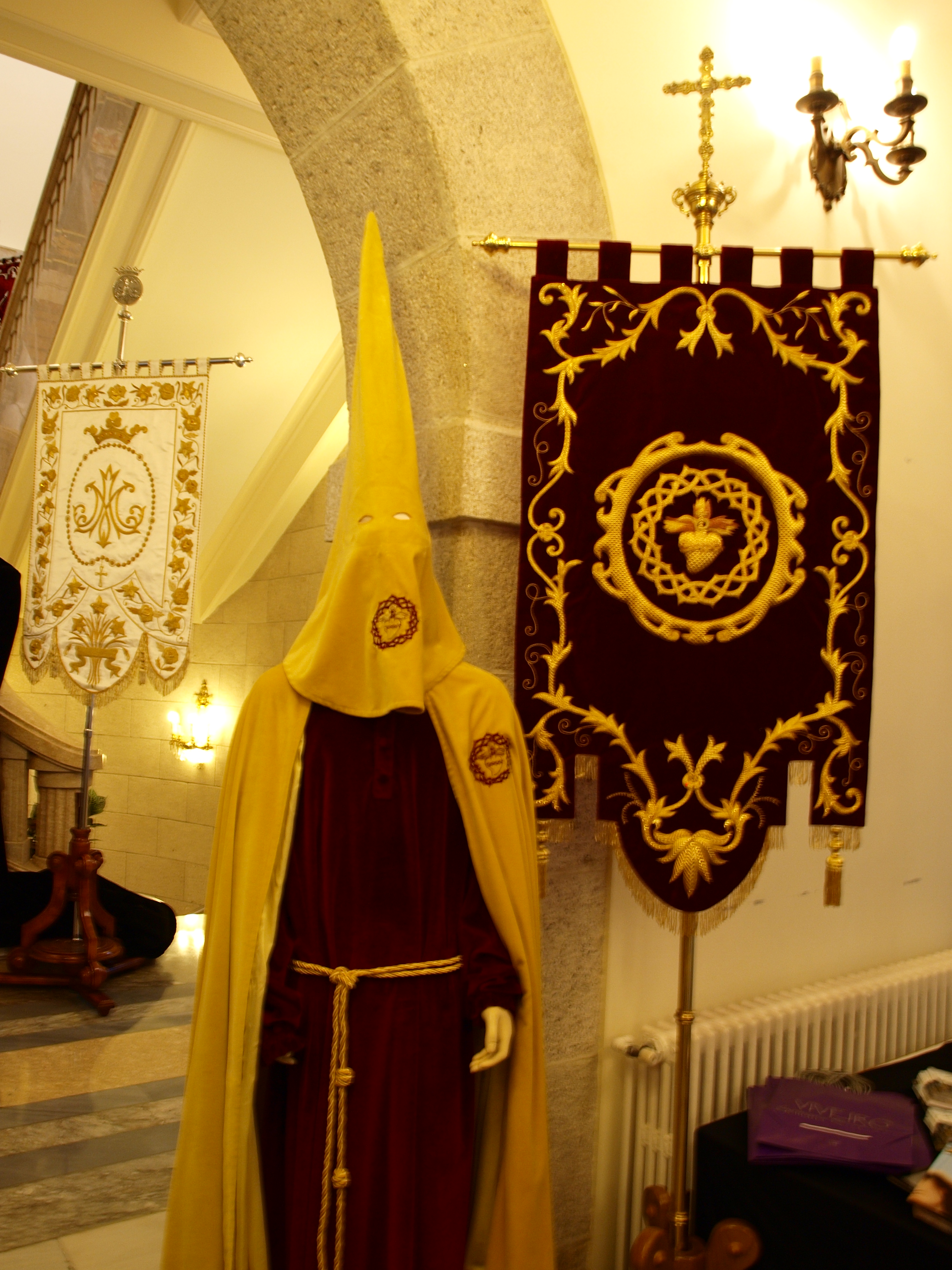 Estandarte y vestimenta de la Cofradía de Nazareno dos de Fora